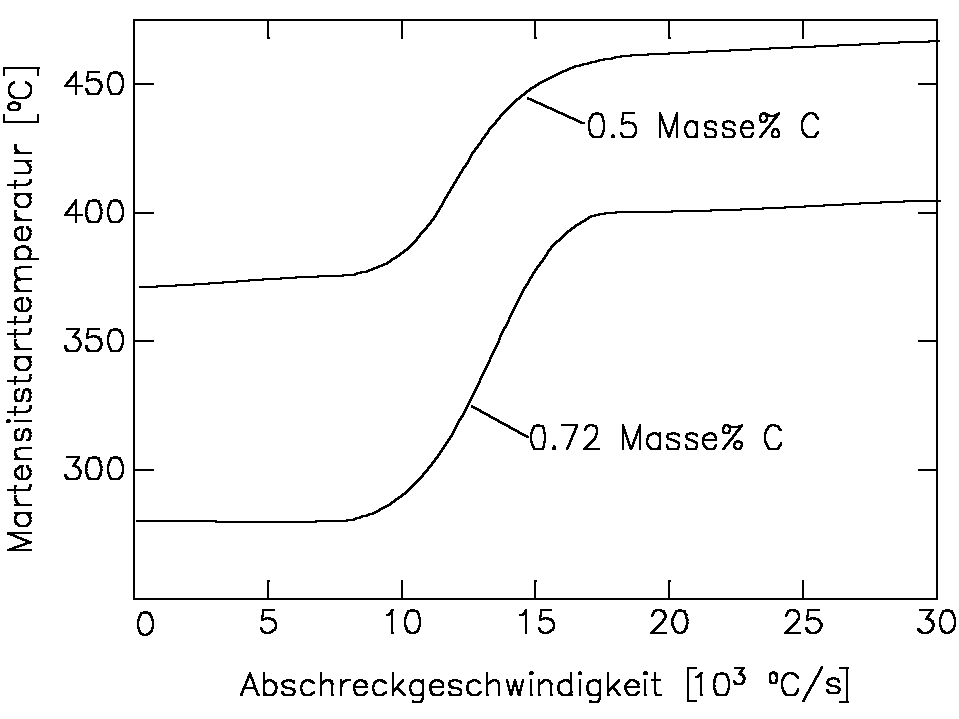 Einfluss der Abschreckgeschwindigkeit va auf MS bei unlegier­ten Stählen